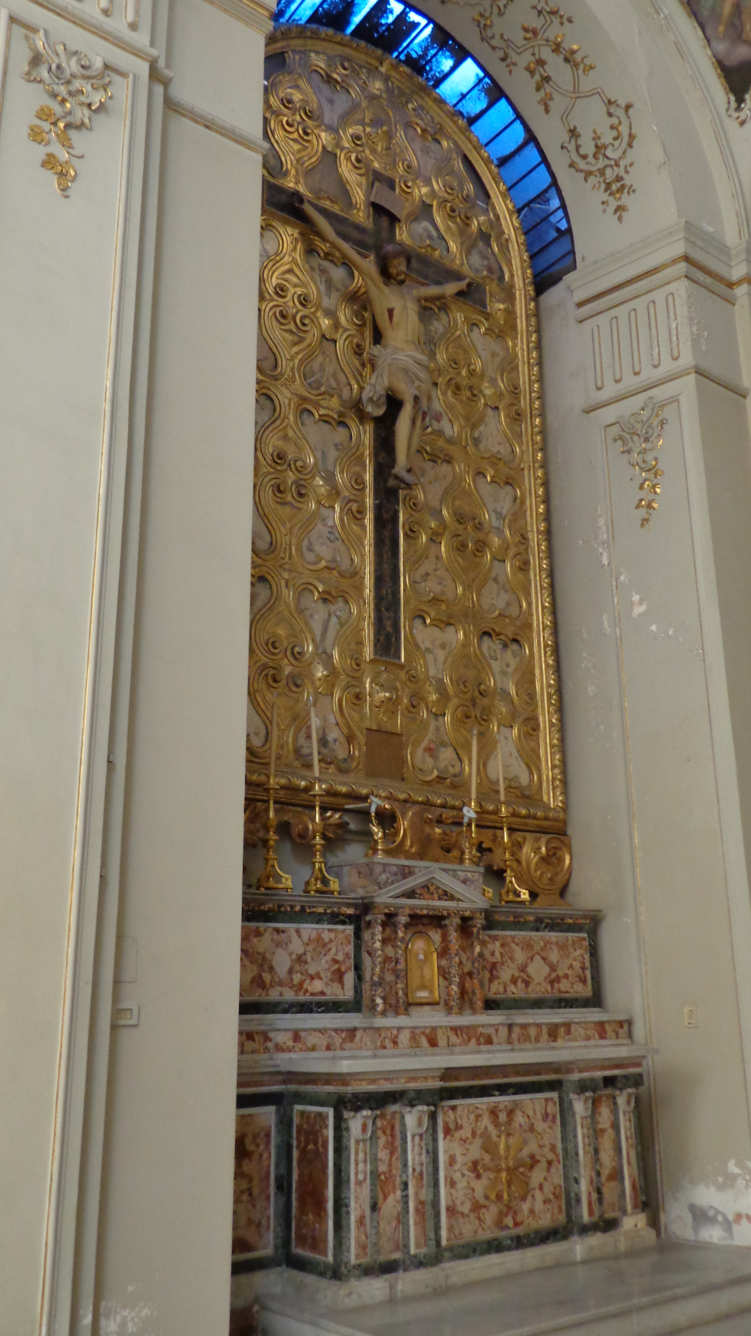 Abside minore sx